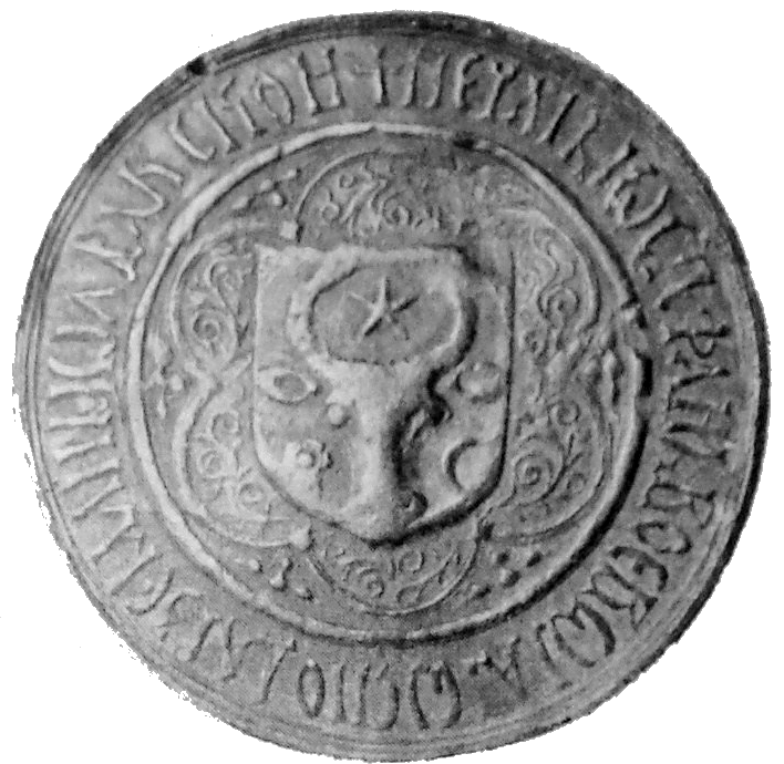 Беларуская (тарашкевіца): Пячатка Стэфана III Вялікага, 1457—1504 гг.